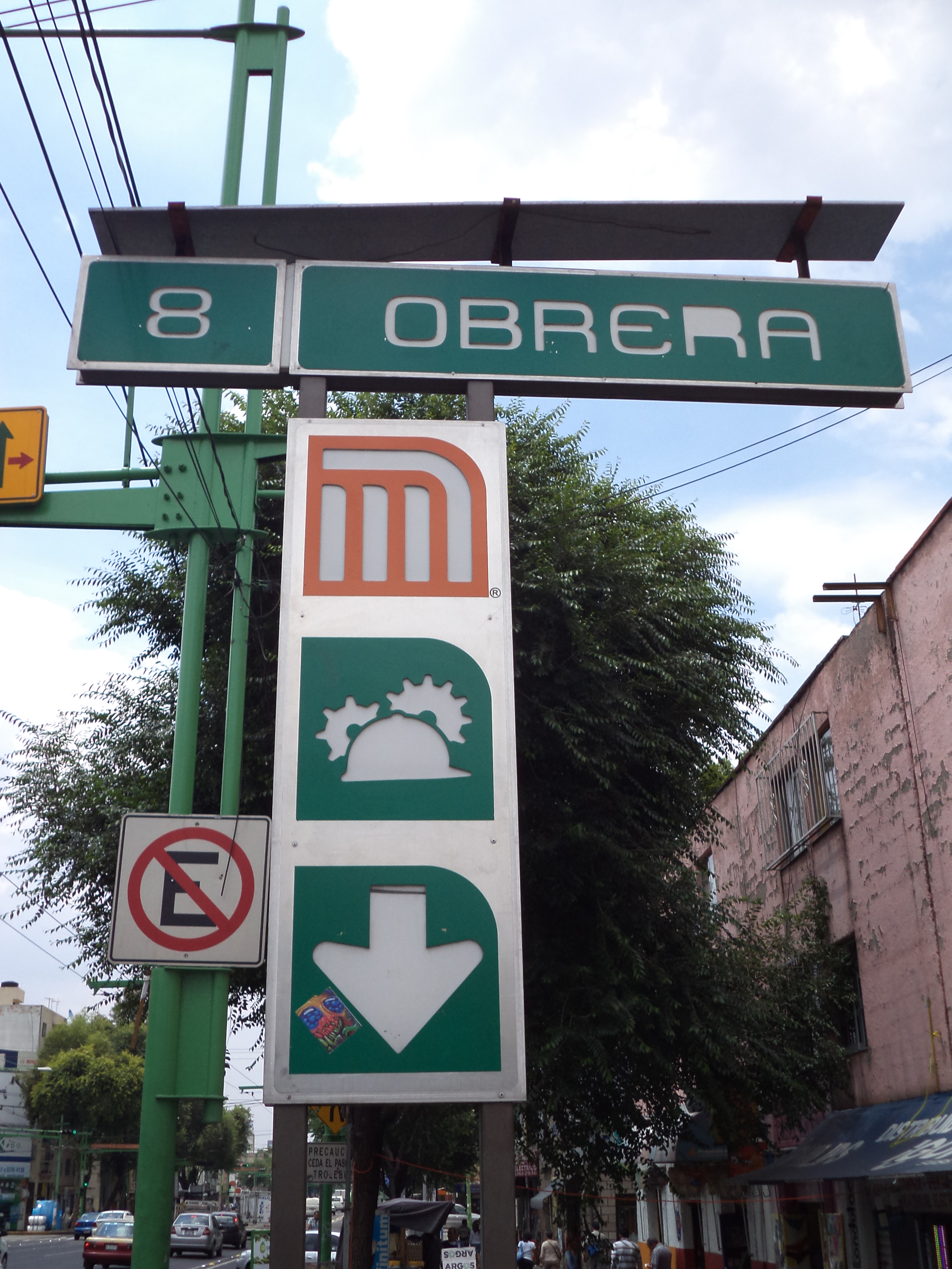 Letrero Obrera